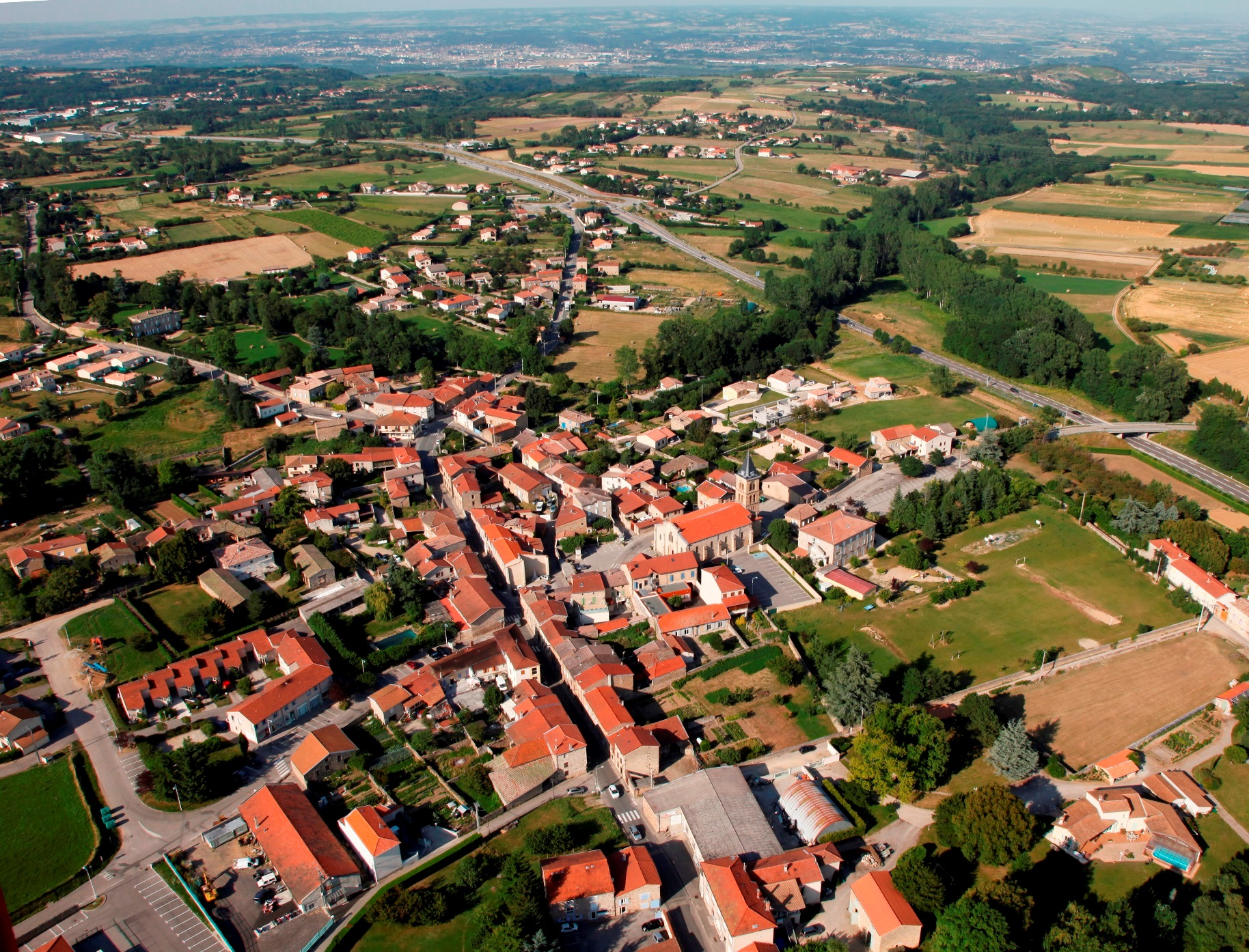 Peaugres détail